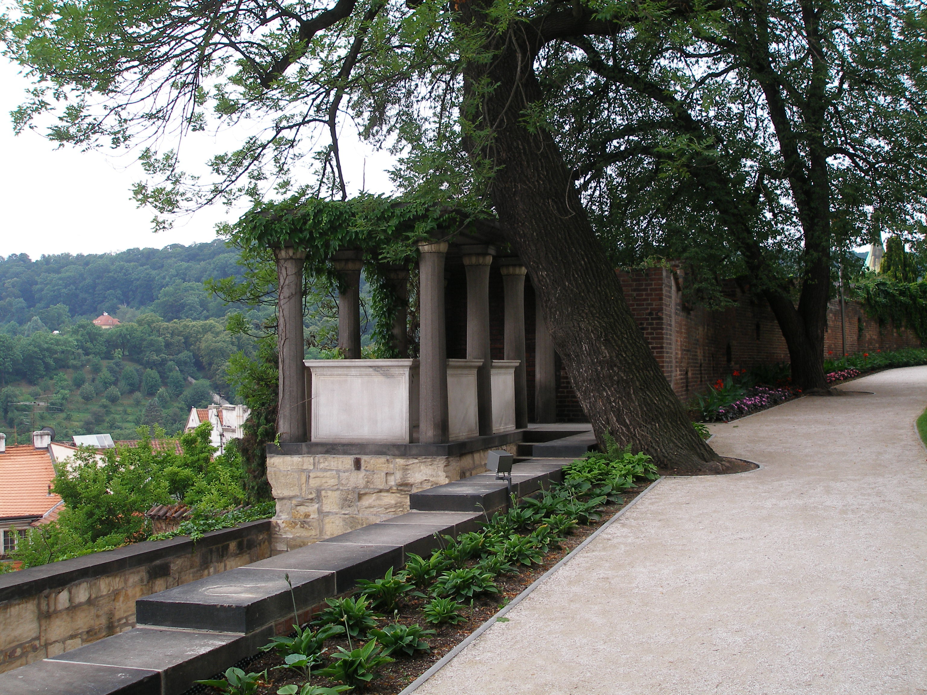 Malý Belvedér od Josipa Plečnika v Jižních zahradách Pražského hradu.